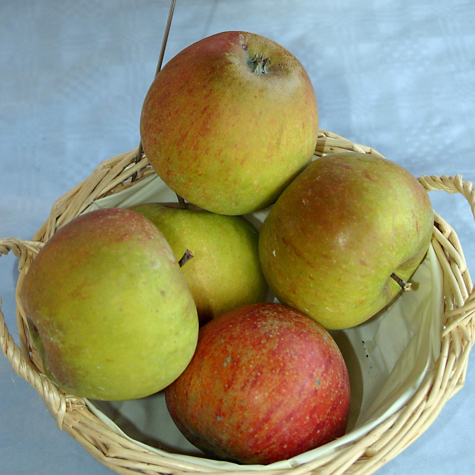 Malus "Cox Orange Renette"